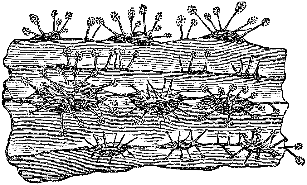 Slika 346. Črni gomoljčki trtnega koreninosesa.